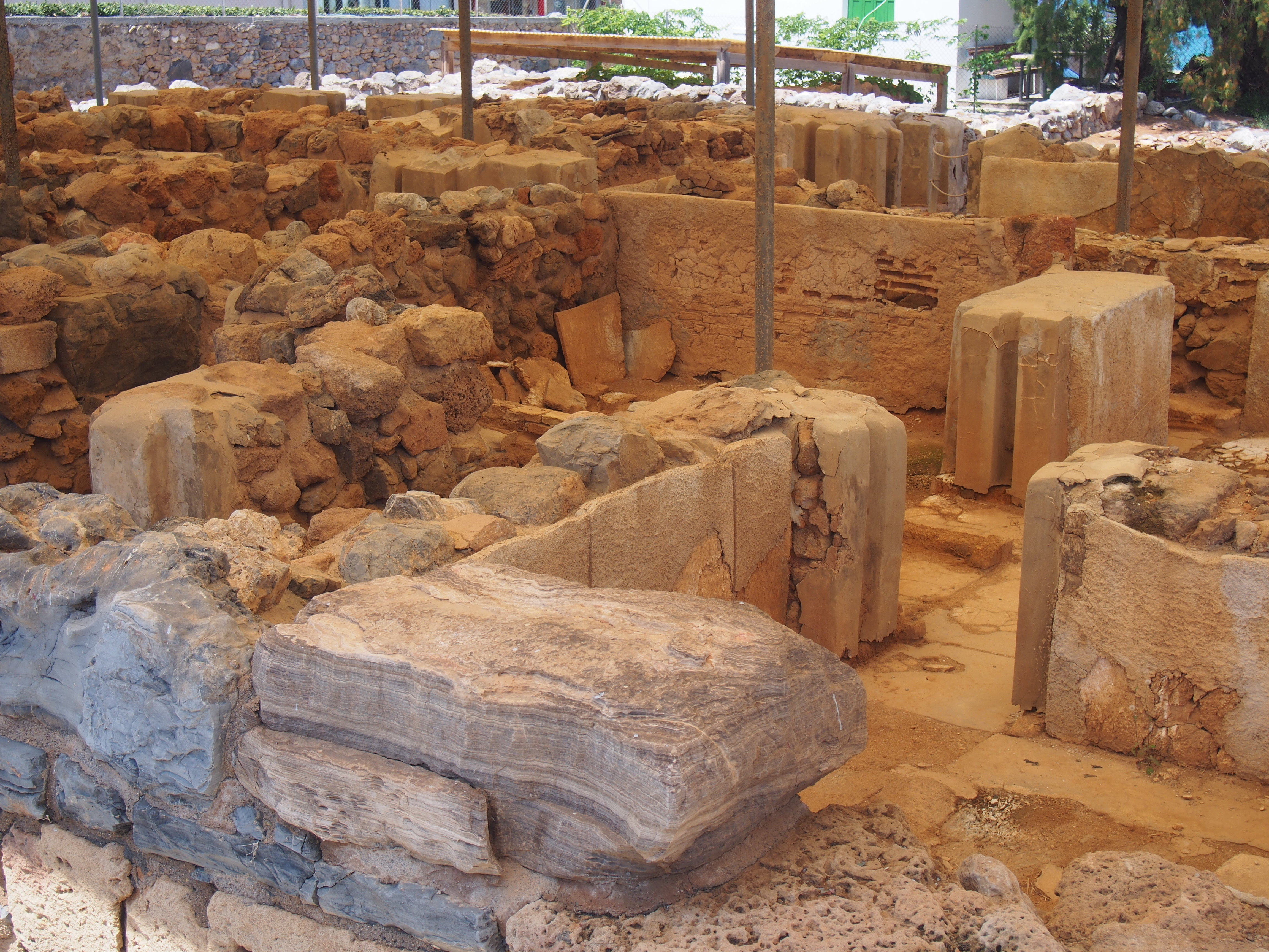 Μινωική έπαυλη Νίρου Χάνι«Μινωική έπαυλη Νίρου Χάνι»